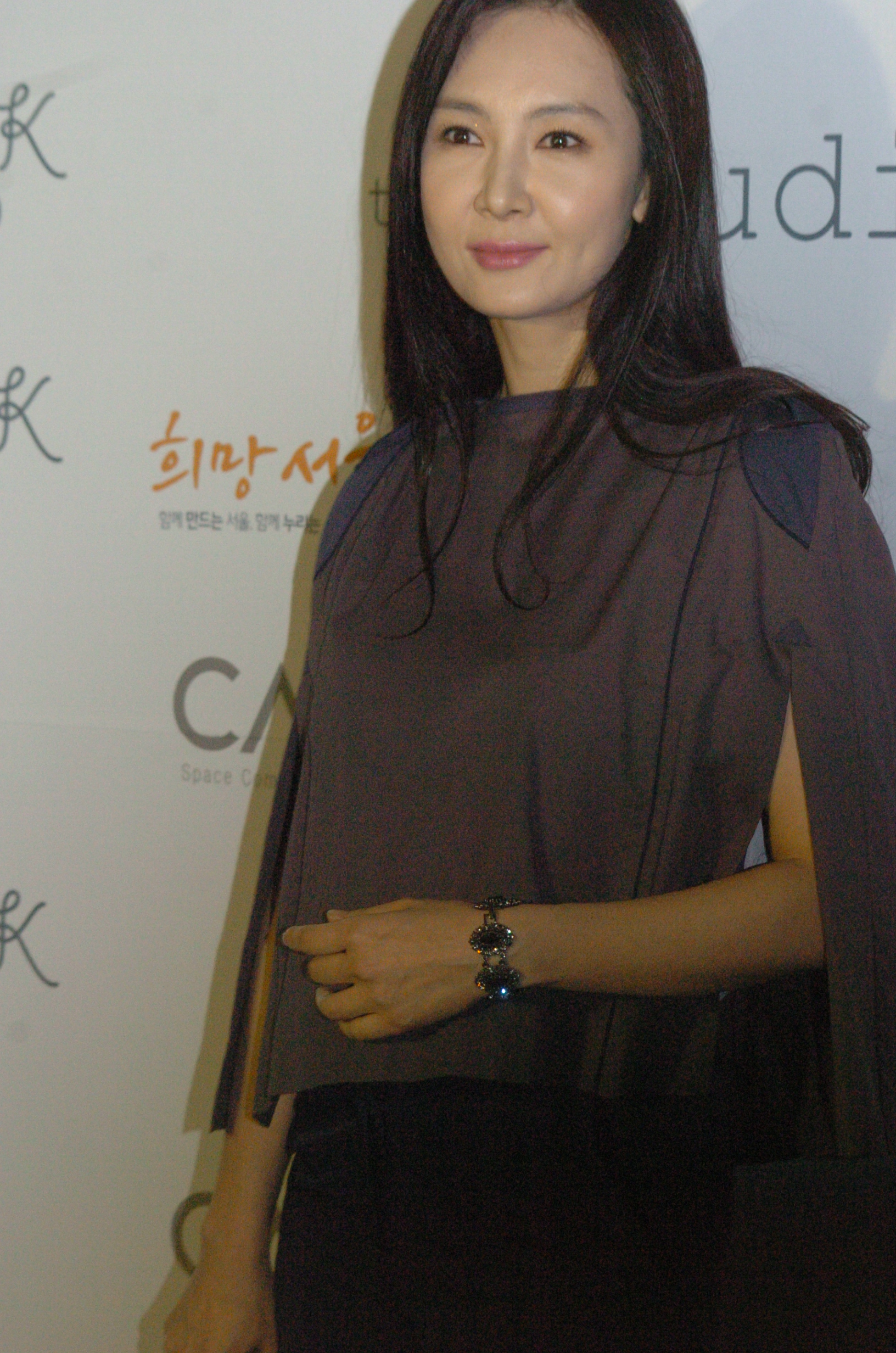 2012 가을겨울서울패션위크